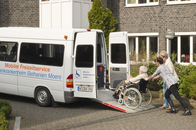 Der Sozialdienst sorgt für Abwechslung